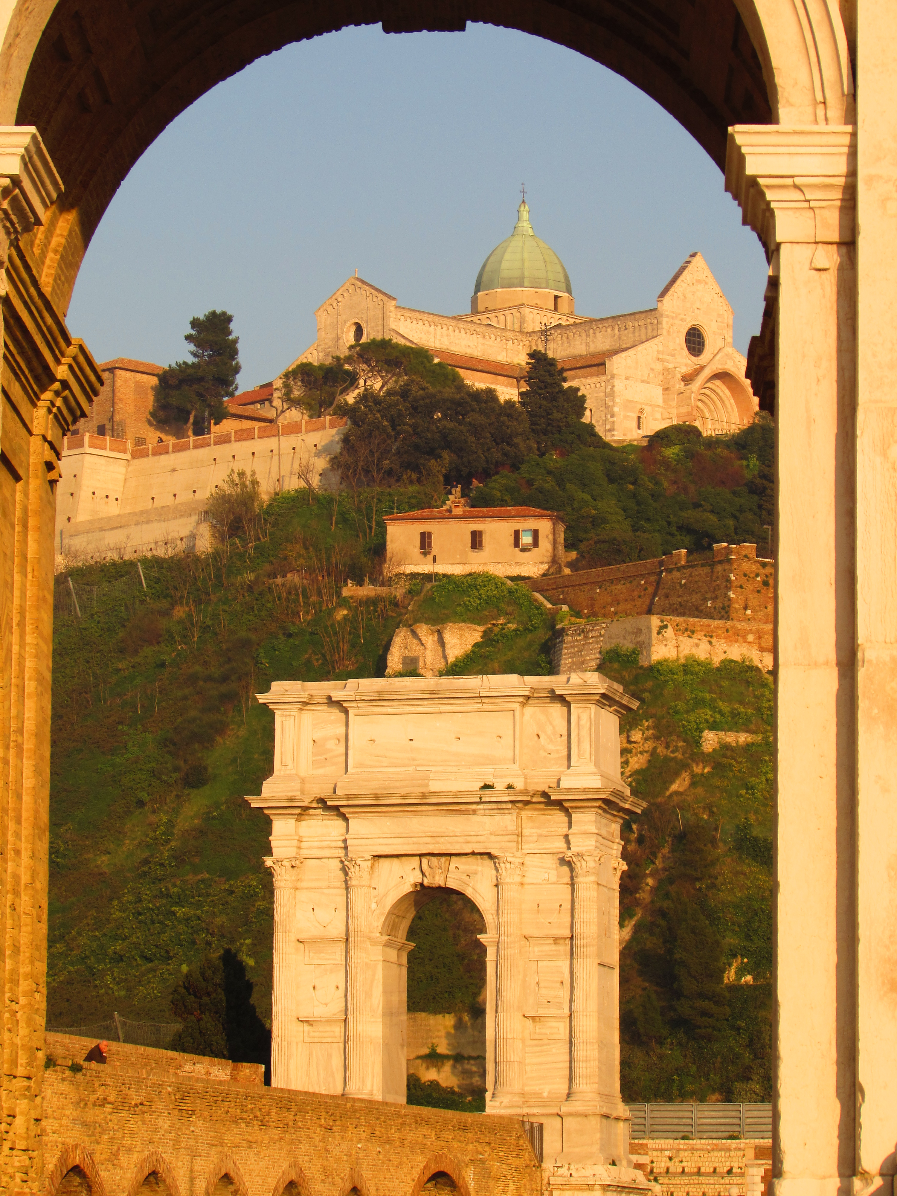 Arco di Traiano e San Ciriaco This is a photo of a monument which is part of cultural heritage of Italy.